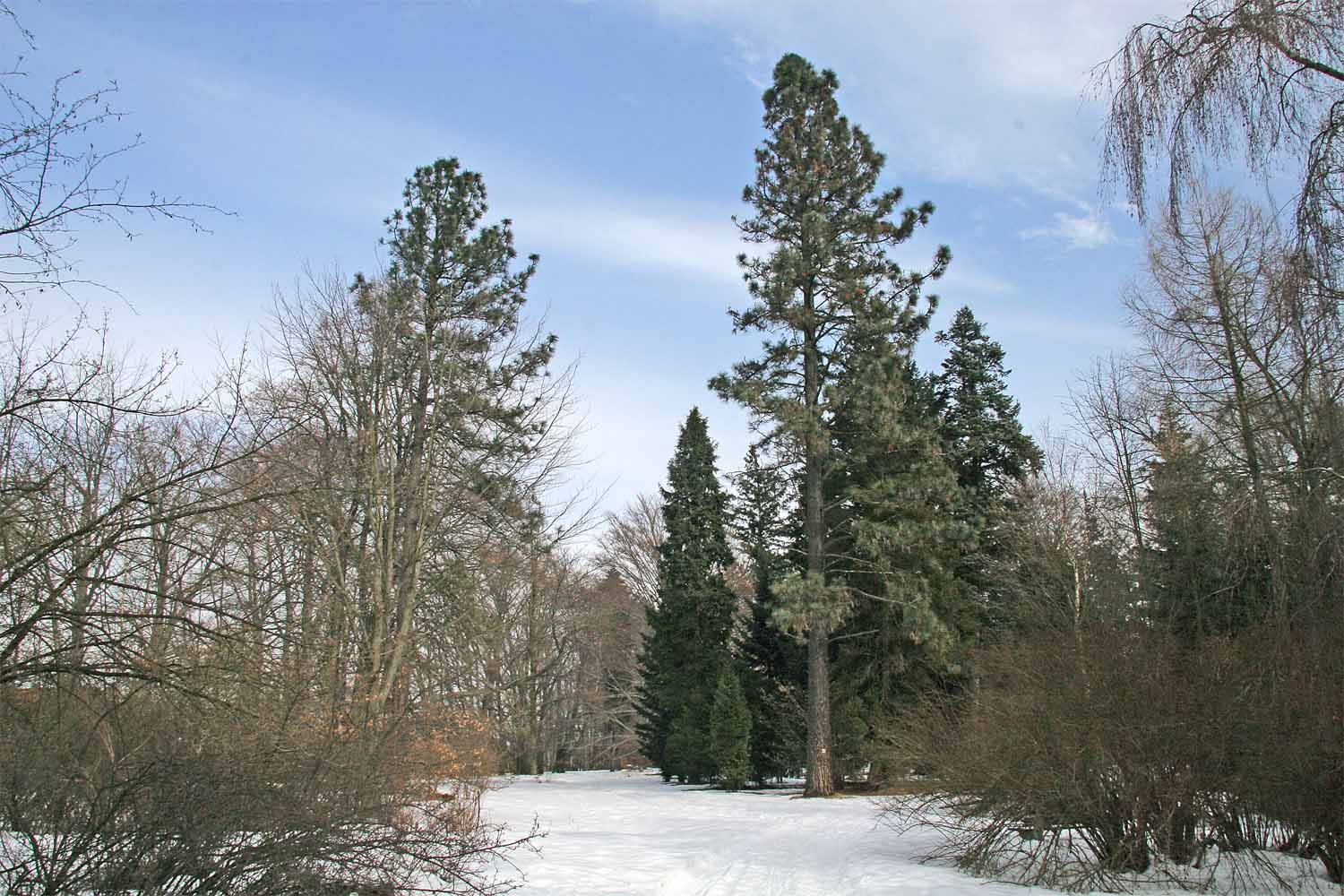 Arboretum Vysoké Chvojno autor:Zp